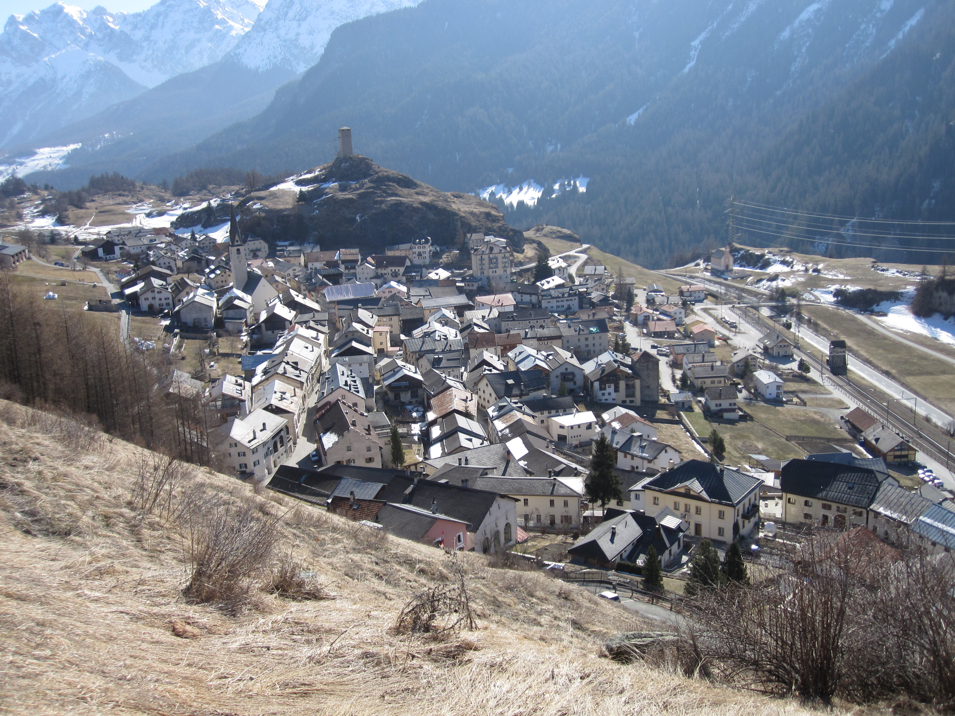 Ardez im Unterengadin